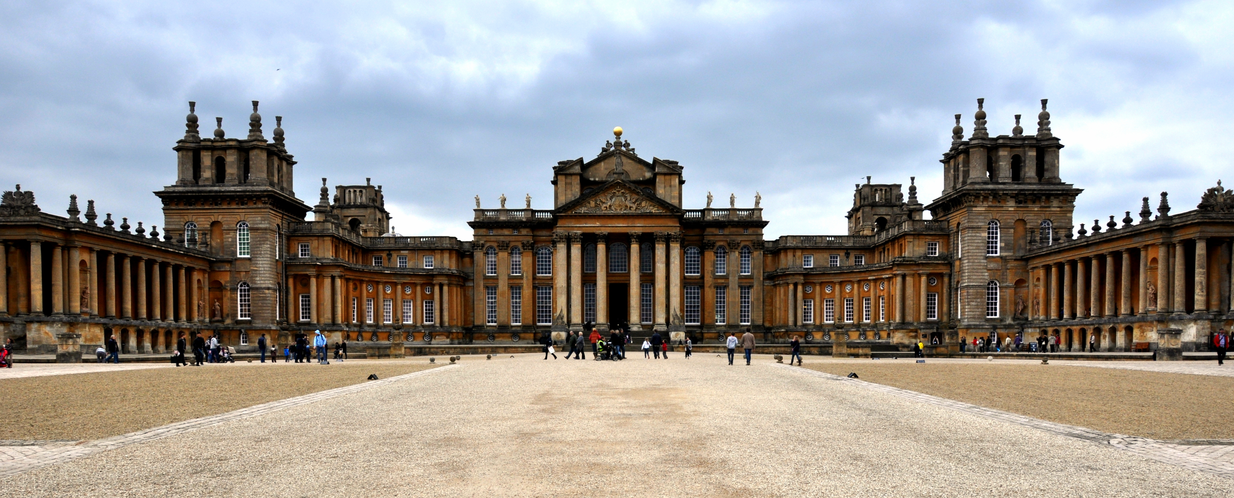 Blenheim Palace - North